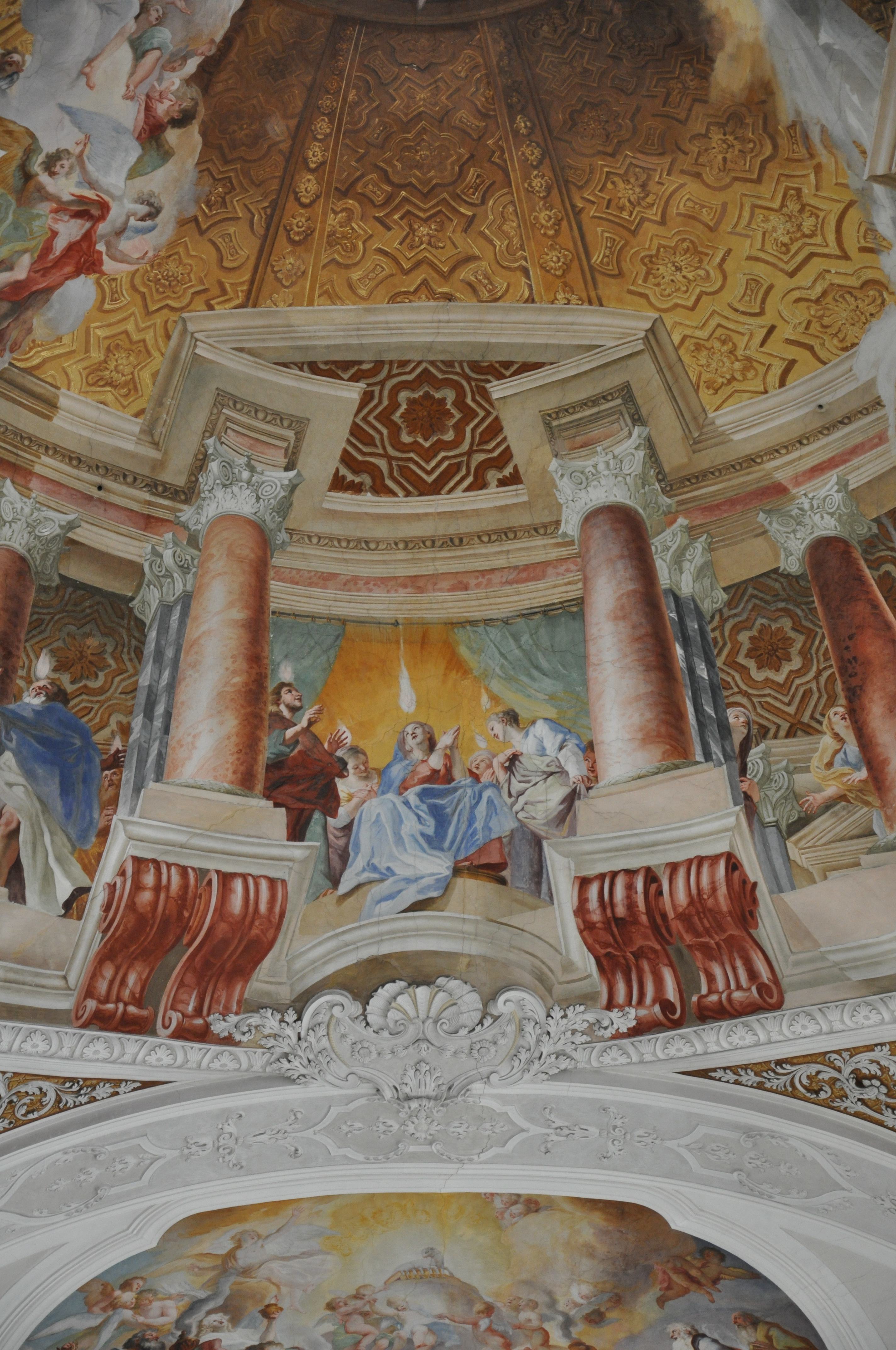 Weingarten (Württemberg) , Basilika St. Martin und Oswald, Fresken von Cosmas Damian Asam, 1718–1720 Chorfresko „Pfingtswunder“, Detail